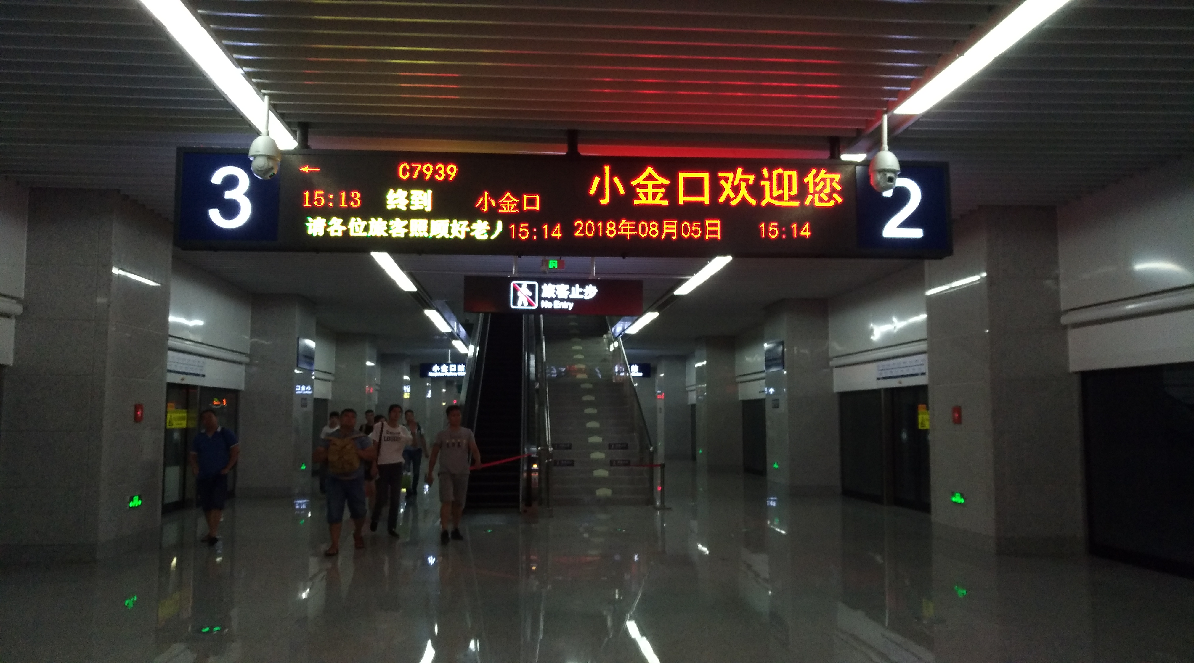 中国铁路 小金口站 站台